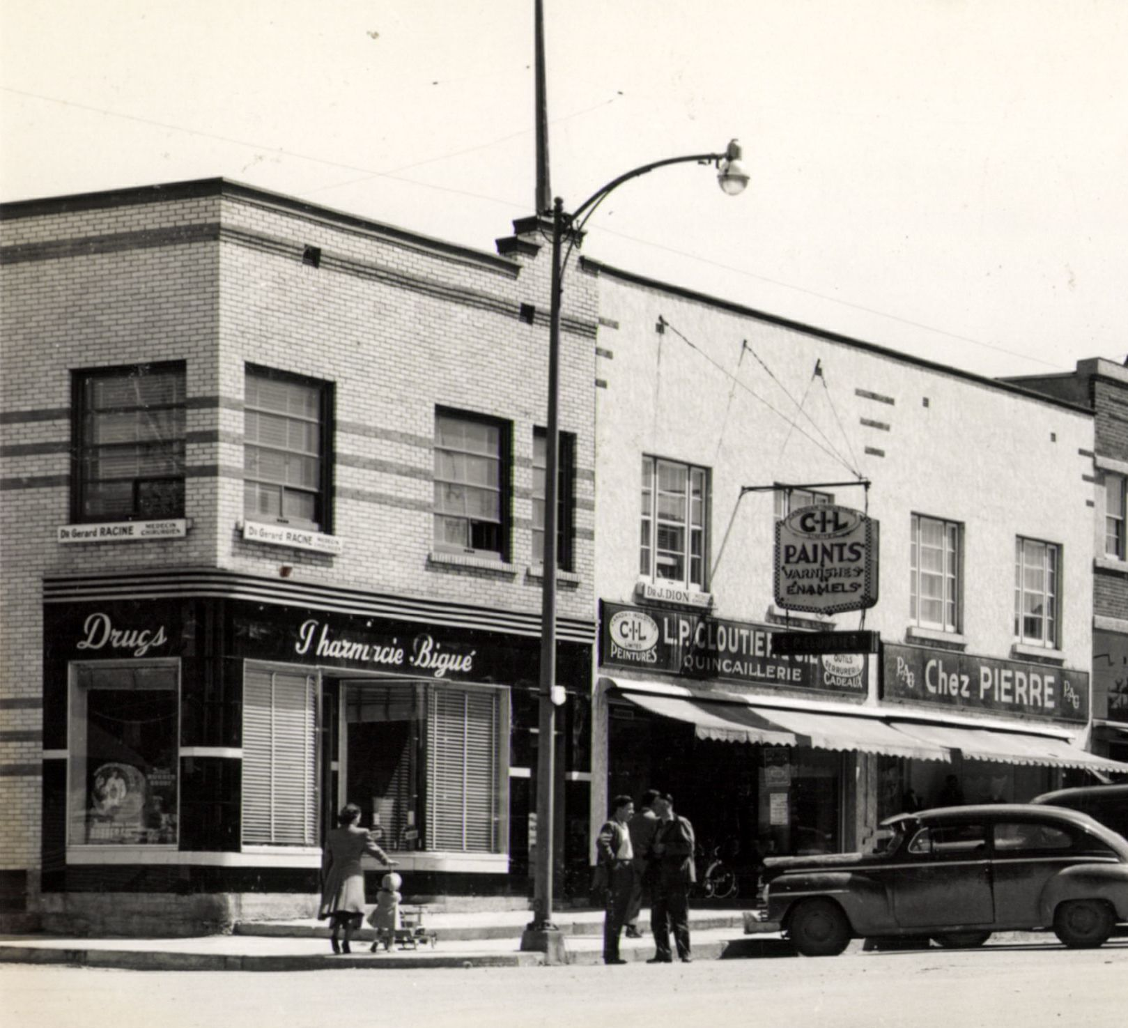 Amos, carte postale